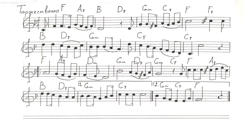 Клавир официального Гимна города Великие Луки